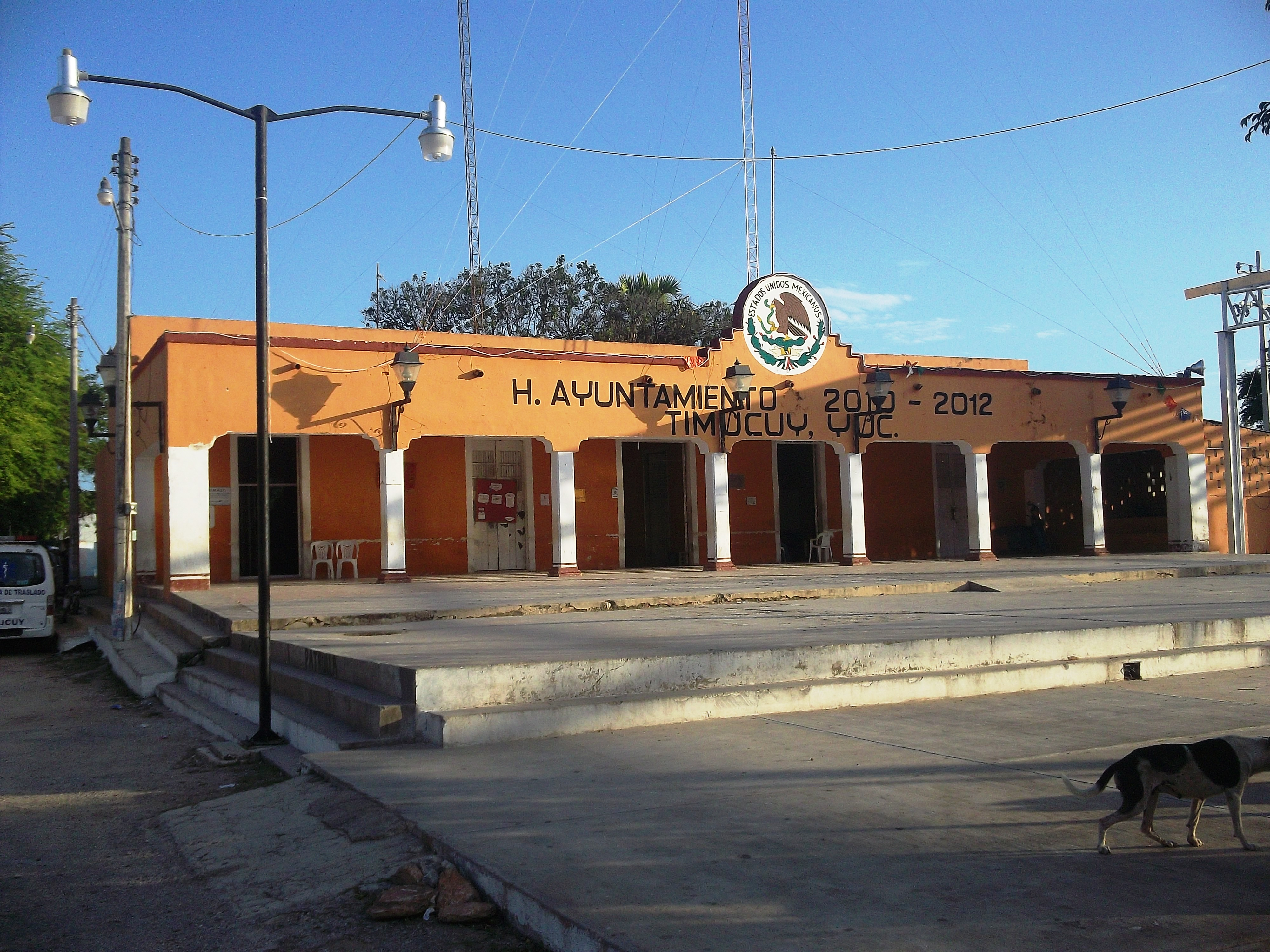 Palacio muncipal de Timucuy, Yucatán.